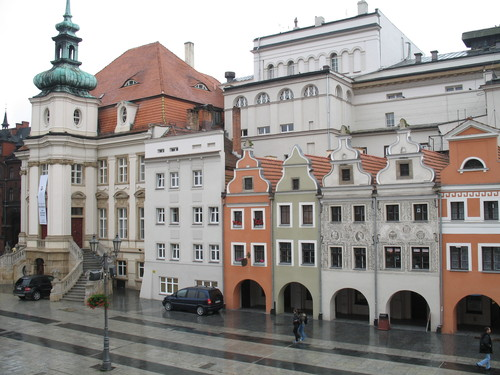 Kamieniczki "Śledziówki" na legnickim rynku